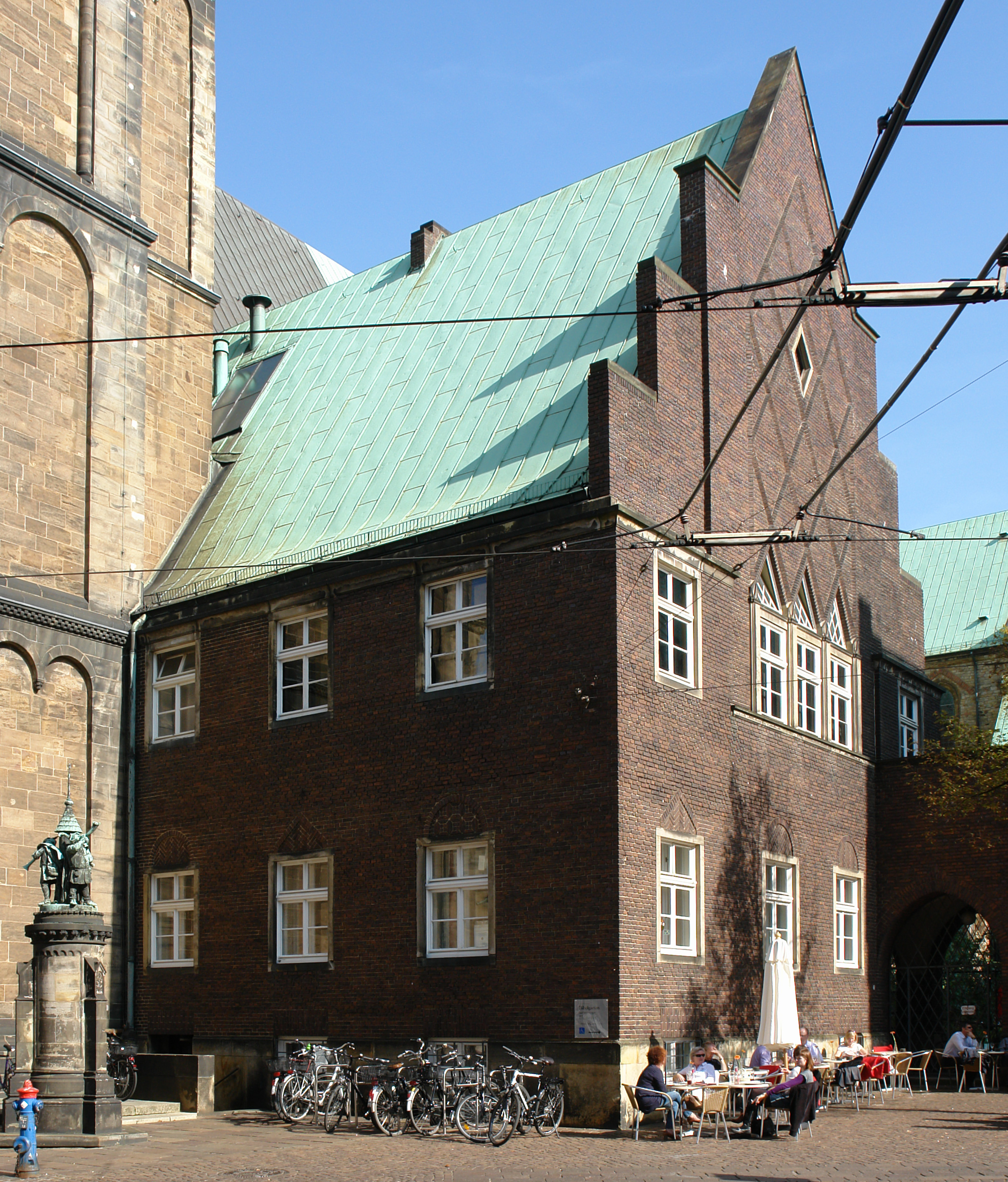 Küsterhaus der Domgemeinde in Bremen, Am Dom 2.Das abgebildete Objekt ist ein geschütztes Kulturdenkmal in der Freien Hansestadt Bremen, mit der Nr. 0177 beim Landesamt für Denkmalpflege registriert.